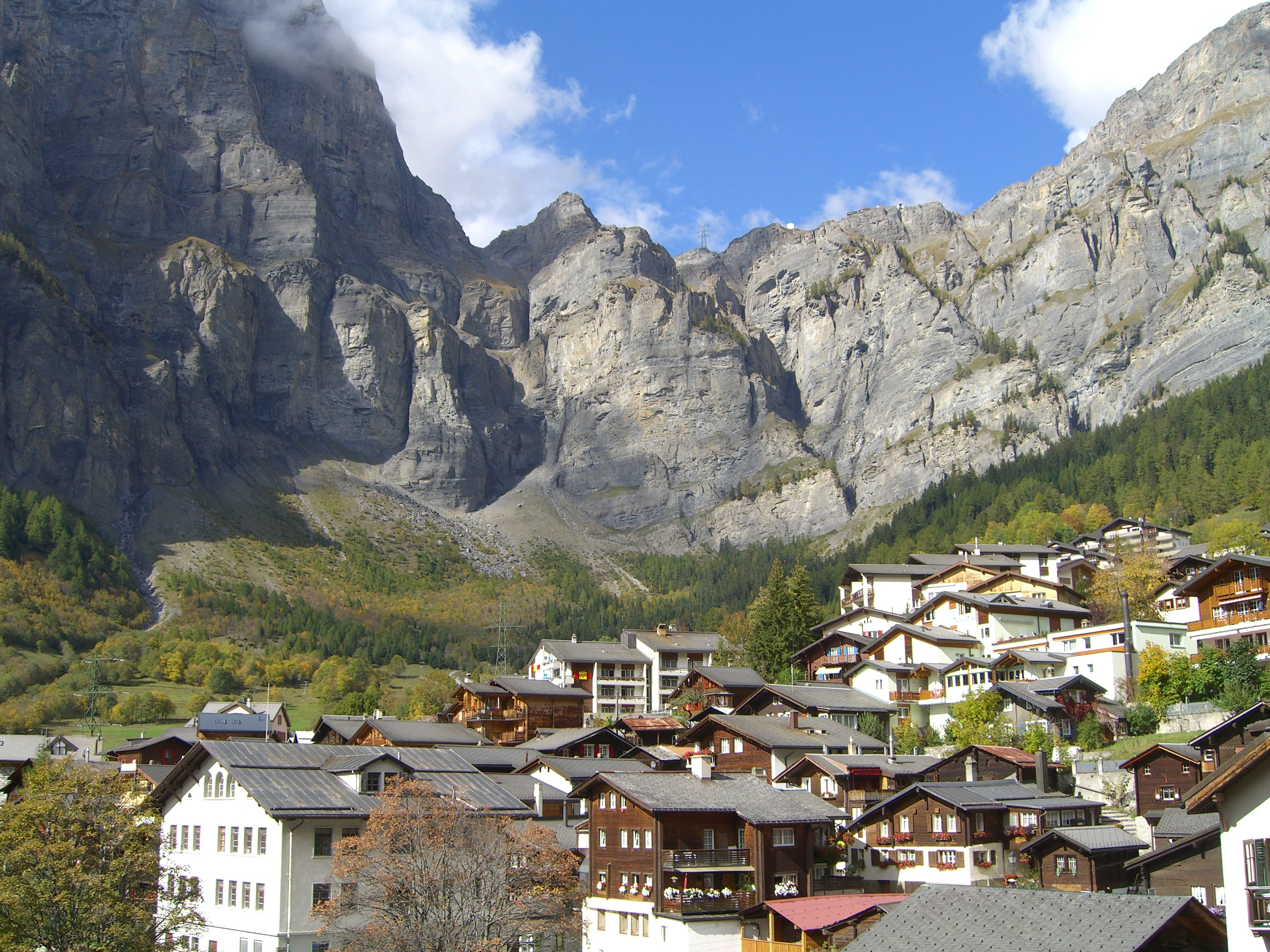 Leukerbad, Valais